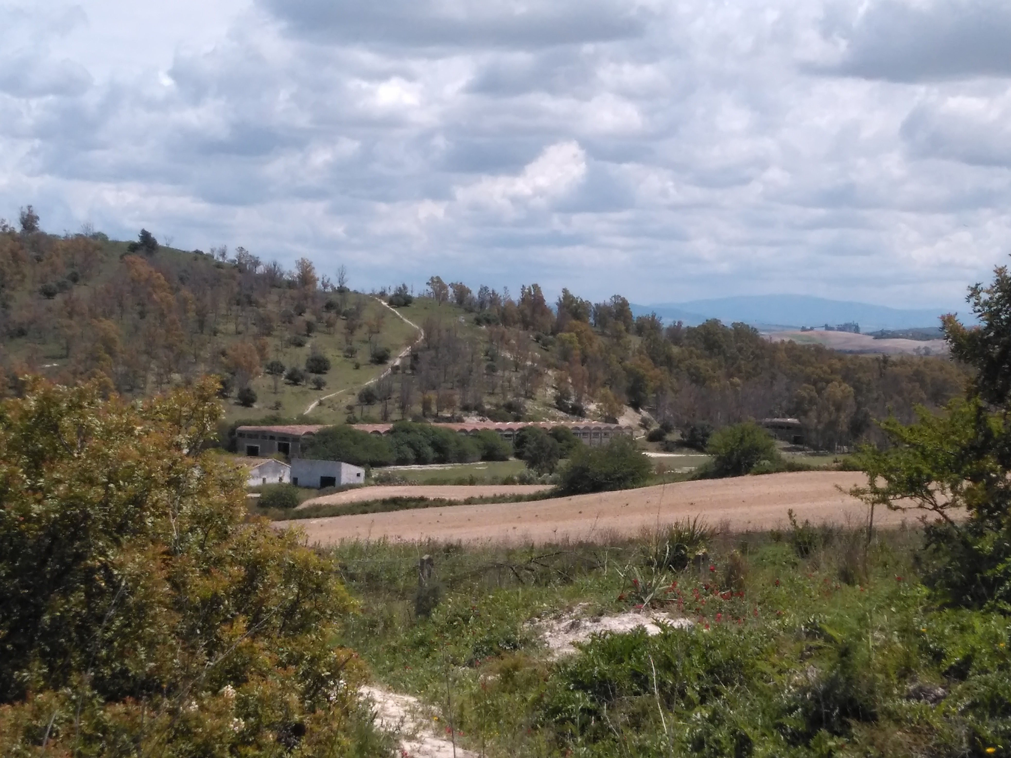 rancho La Bola desde la Sierra de San Cristóbal